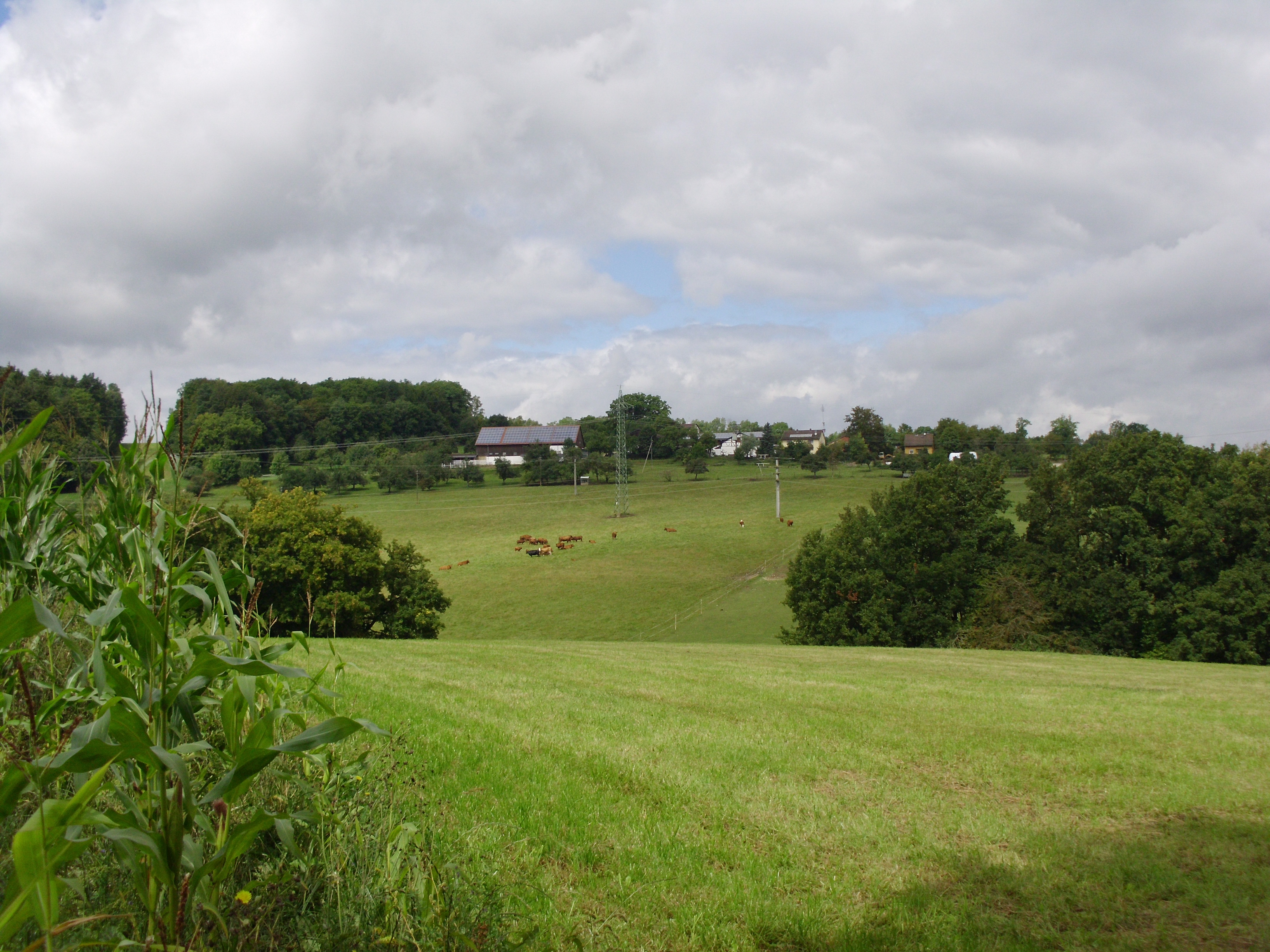 Hürth, Ortsteil von Treuchtlingen im mittelfränkischen Landkreis Weißenburg-Gunzenhausen